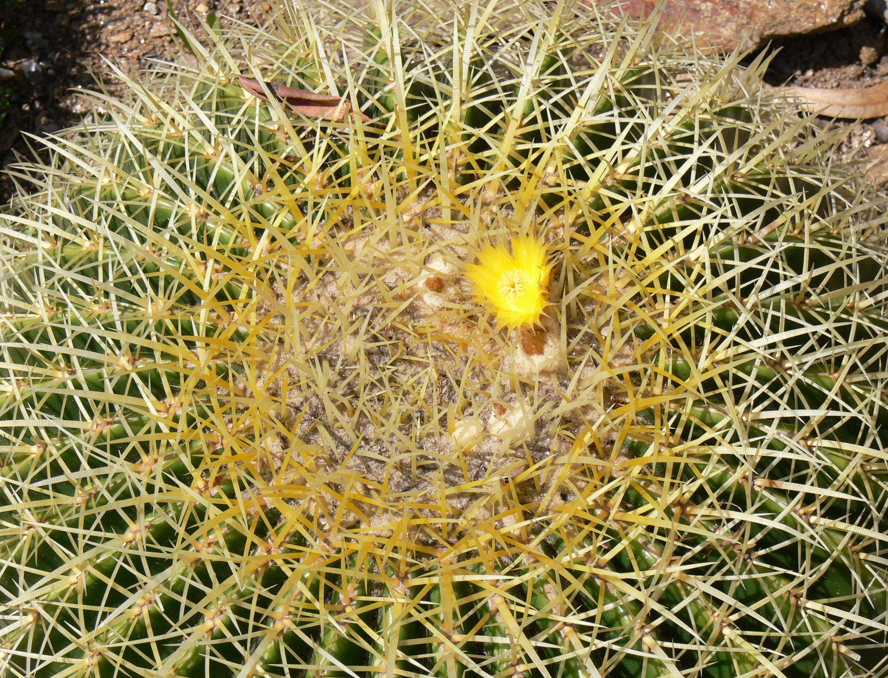 Echinocactus grusonii, Jardin botanique du Royal (Var, (France) avril 2006). Auteurs Jodelet / Lépinay